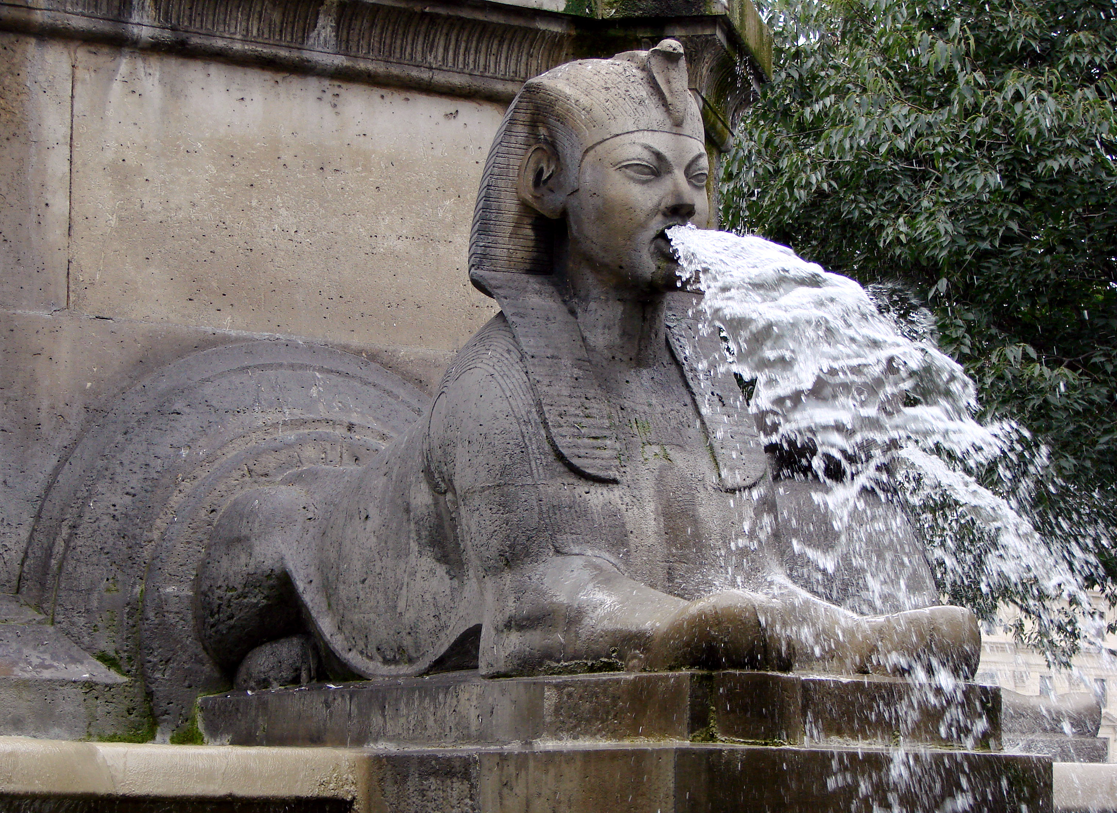 la Fontaine du Palmier, Place du Châtelet à Paris (1808): sphinx, par Gabriel Davioud.